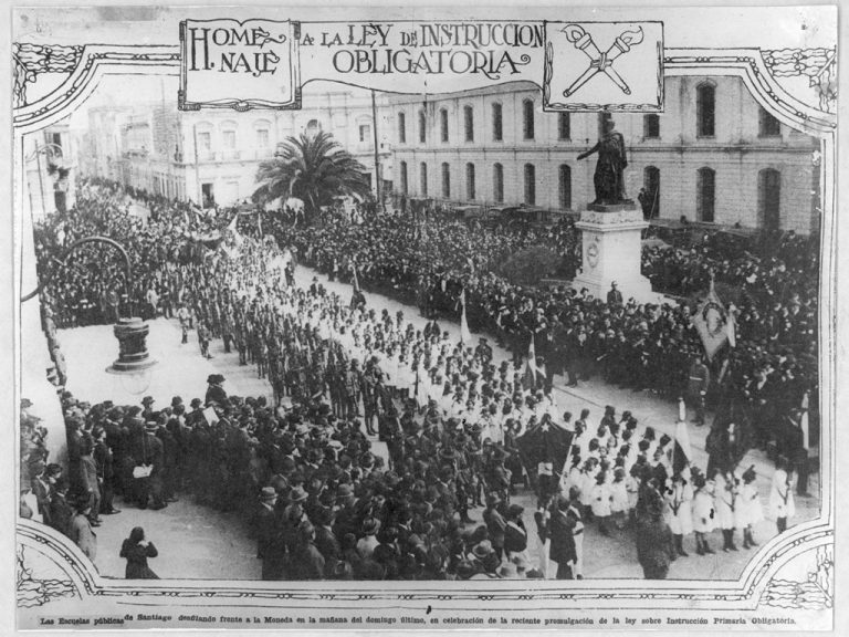 "La promulgación de la Ley de Instrucción Primaria Obligatoria se celebró con un feriado nacional y un gran acto cívico, el 29 de agosto de 1920. En la ceremonia, escolares y maestros desfilaron cantando el himno “Patria Nueva” escrito por Darío Salas y compuesto por Julio Guerra. A partir de esta ley, los padres estaban obligados a llevar a sus hijos, durante cuatro años a lo menos, a un establecimiento de educación primaria fiscal, municipal o particular."